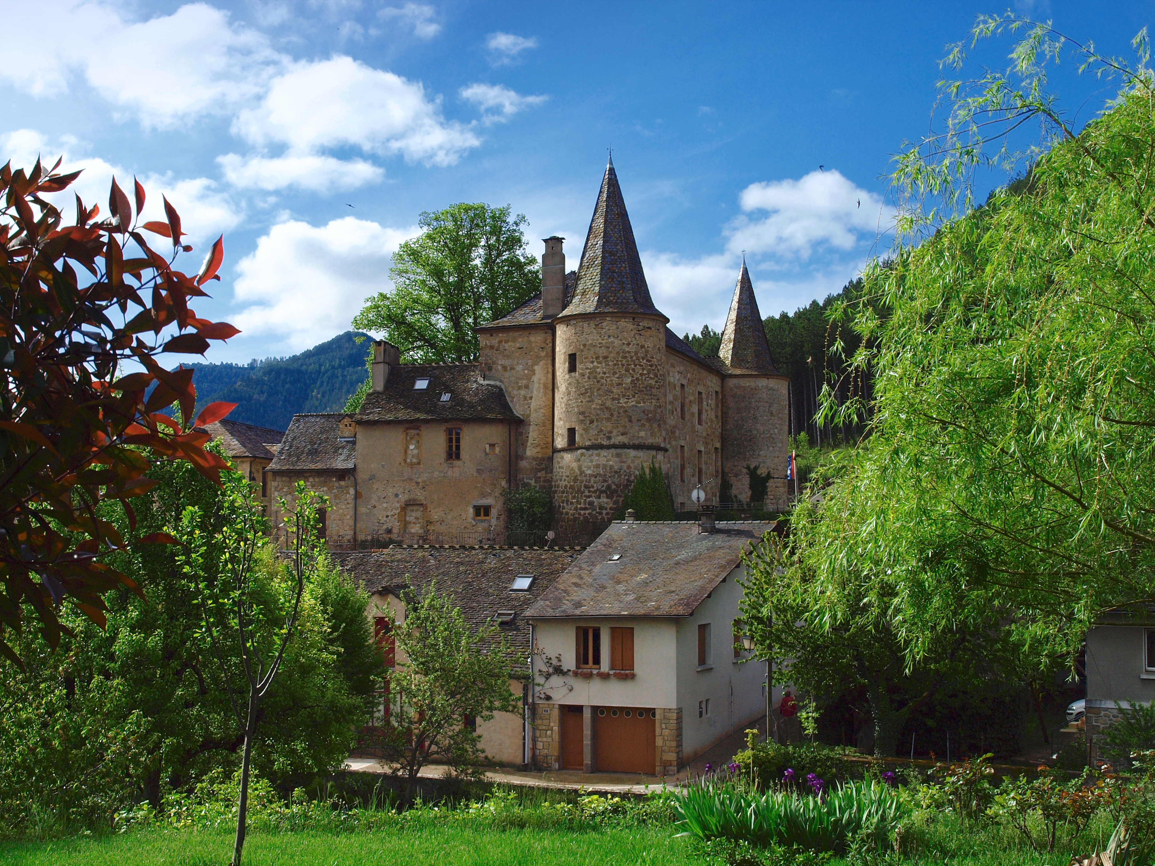 Florac (Lozère) - Le château, siège du Parc national des Cévennes